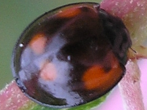 Pine Ladybug (Exochomus quadripustulatus). This (youngster?) was sitting on some flowery plant rather than on a pine tree (abundant in the area however). Location: Motorway rest area Lucasgat near Apeldoorn, Netherlands. Keywords: black, red, rimmed shield --- nl: Viervleklieveheersbeestje (Exochomus quadripustulatus). Dit (jonge?) lieveheersbeestje zat op wat onkruid in plaats van op de gebruikelijke naaldbomen (wel veel aanwezig vlak in de buurt). Locatie: Parkeerplaats "Lucasgat" aan de A1 bij Apeldoorn Trefwoorden: zwart, rood, rand aan schild --- de: Vierfleckiger_Kugelmarienkäfer (Exochomus quadripustulatus). Diese (junge?) Tier lief auf einer Pflanze herum - nicht auf die viele Nadelbaume in der nähe.